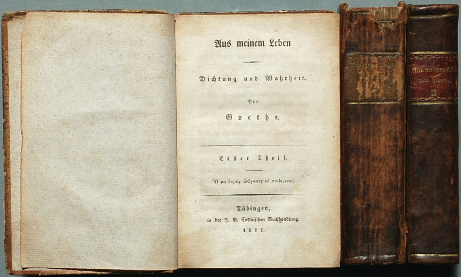 Johann Wolfgang von Goethe (1749–1832) Description German poet Date of birth/death28 August 174922 March 1832Location of birth/deathFrankfurt am Main, GermanyWeimar, GermanyAuthority controlVIAF: 24602065 | LCCN: n79003362 | GND: 118540238 | SELIBR: 56318 | BNF: cb11905269k | ULAN: 500014761 | WorldCat | WP-Person Aus meinem Leben / Dichtung und Wahrheit. Von Goethe. Erster Theil. / Zweyter Theil. / Dritter Theil. [3 Bde.] Tübingen, in der J. G. Cottaischen Buchhandlung. 1811. XII Seiten + 515 Seiten; 1812. 573 Seiten; 1814. 538 Seiten; Erstdrucke (Hagen 363 D 1. / 2. / 3.). Halbleder der Zeit (15,9 x 10,3 cm) mit Lederecken; Bd. III mit Rückenschild; alle Bände mit umlaufendem Rotschnitt.